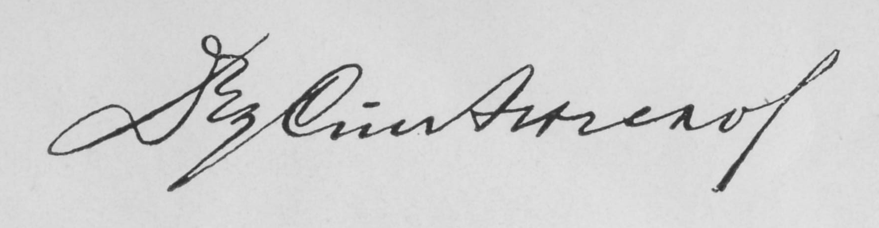 Unterschrift Professor Stephan Angeloff